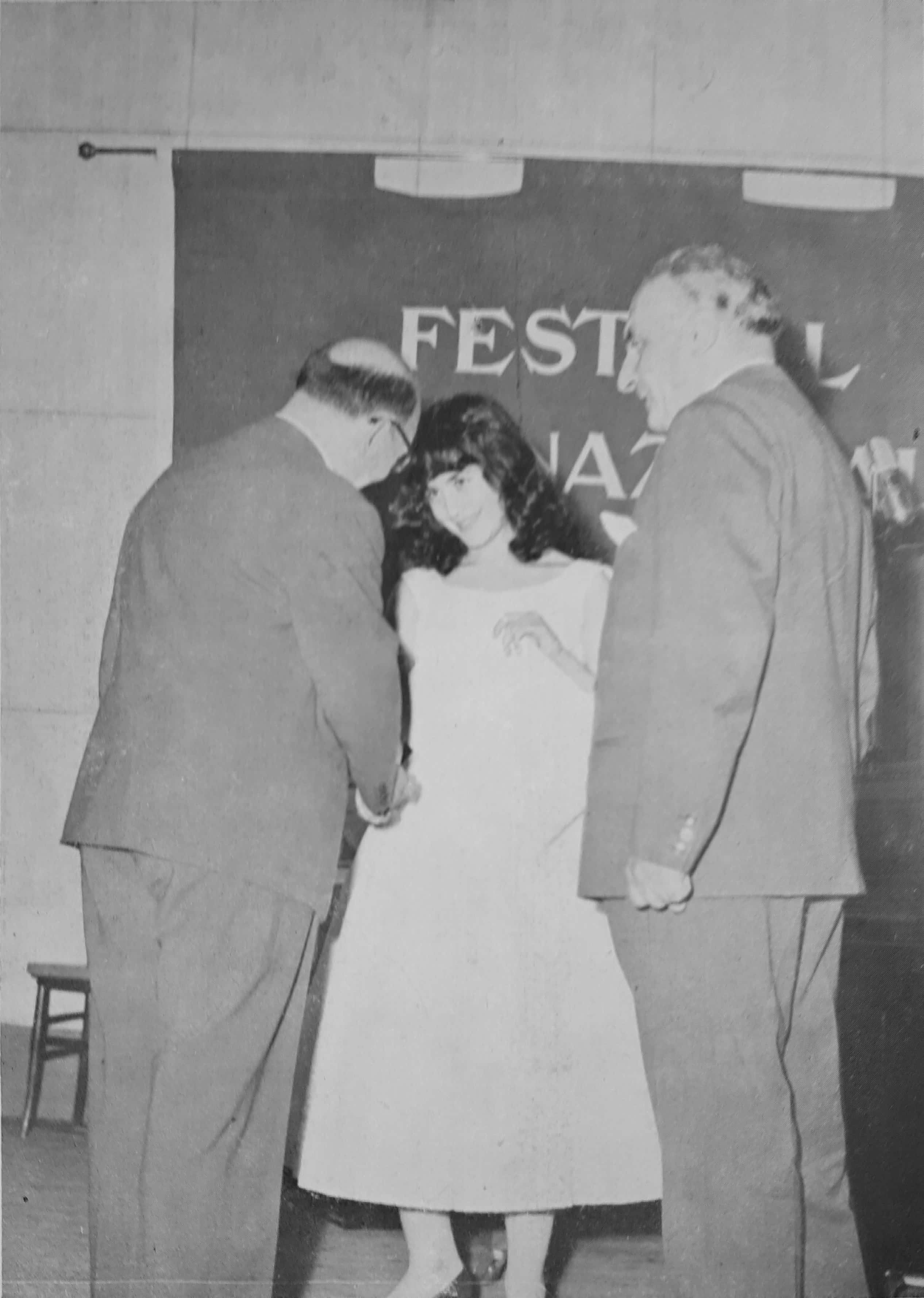 Marta Argerich, vincitrice del concorso pianistico Internazionale Ferruccio Busoni, 1957